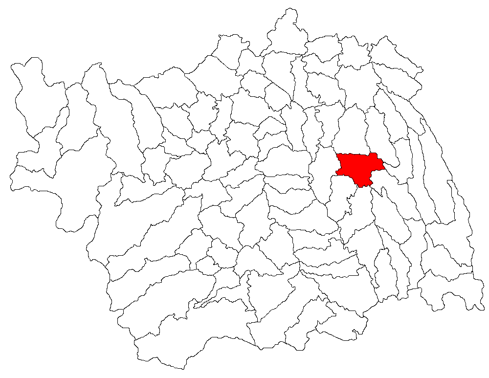 Categorie:Hărţi ale judeţului Bacău